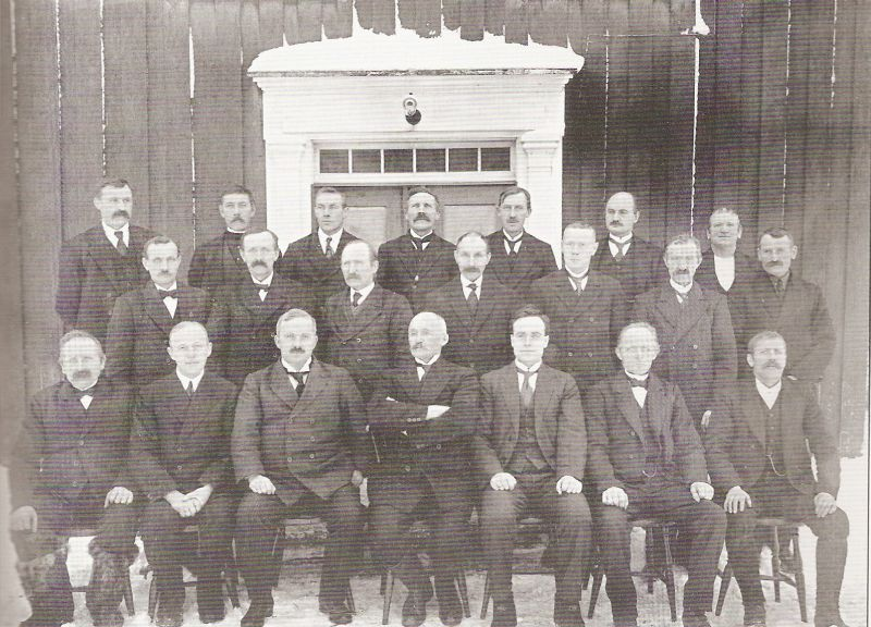 Skatval herredsstyre 1920–1922. Identifiserte personer: Ordfører Karl J.B. Eidsvik (midten, fremste rekke), varaordfører Peter Aune (3. fra h., fremste rekke), Johan L. Fløan (1. fra v., fremste rekke), Johan Belsvik (1. fra v., midterste rekke). Belsvik representerte Arbeiderpartiet.